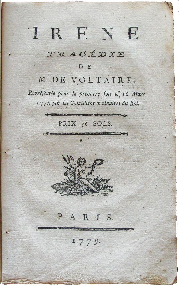 Contrefaçon Irène Voltaire Paris [i. e. Lausanne] 1779